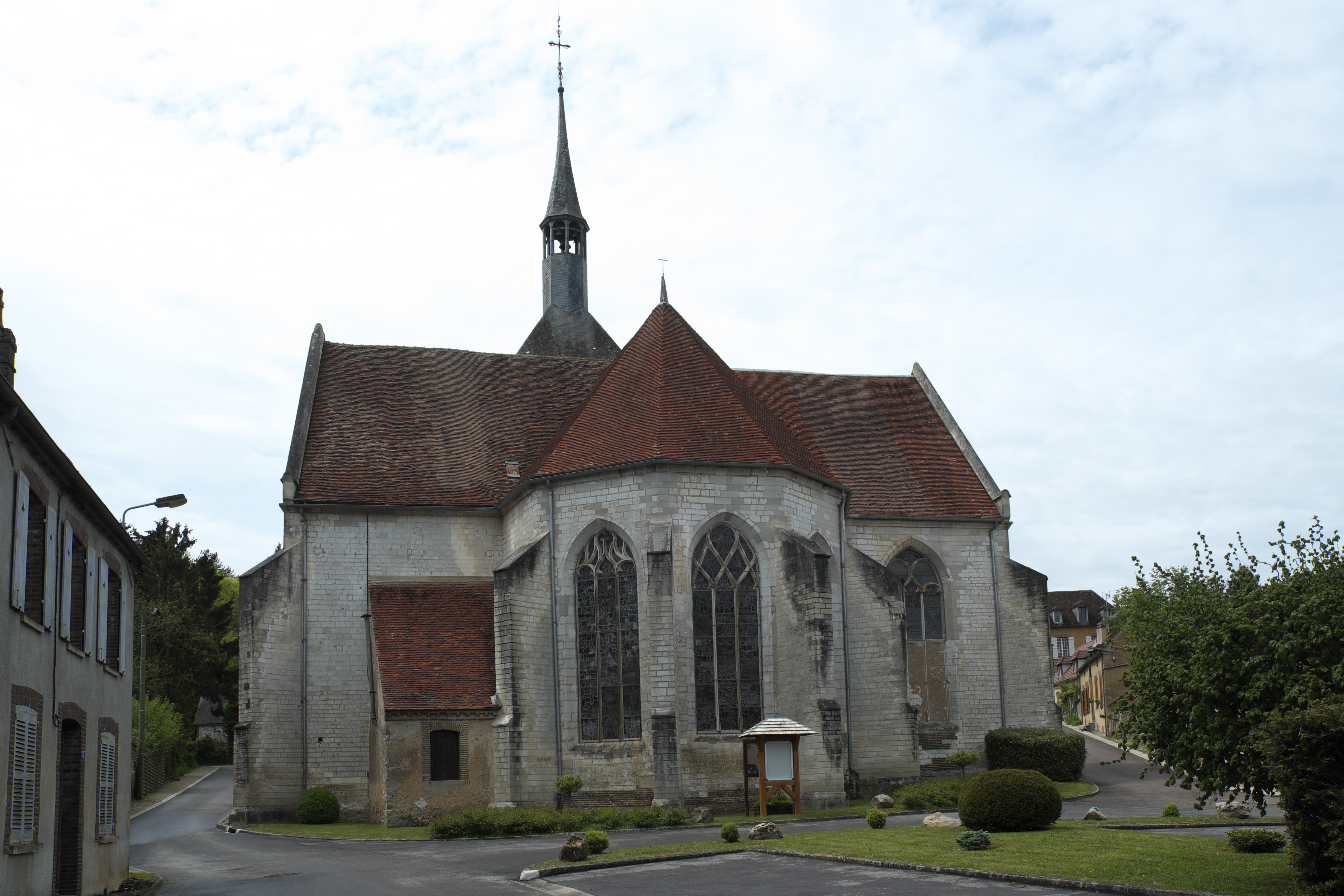 Kirche Notre-Dame-de-la-Nativité in Bérulle im Département Aube (Champagne-Ardenne/Frankreich), Chorhaupt